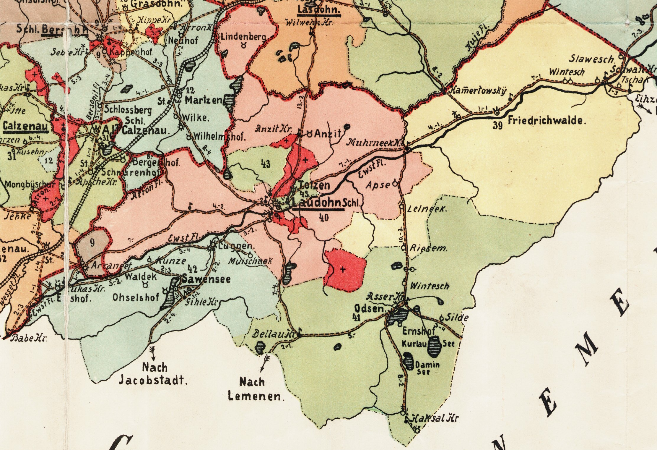 Ļaudona kihelkonna mõisad 1903. aasta kaardil.